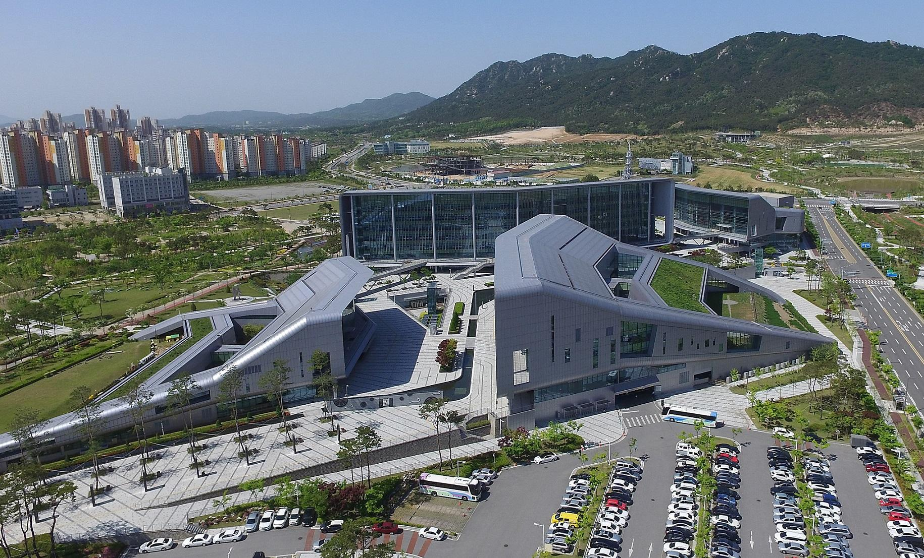 충청남도 청사